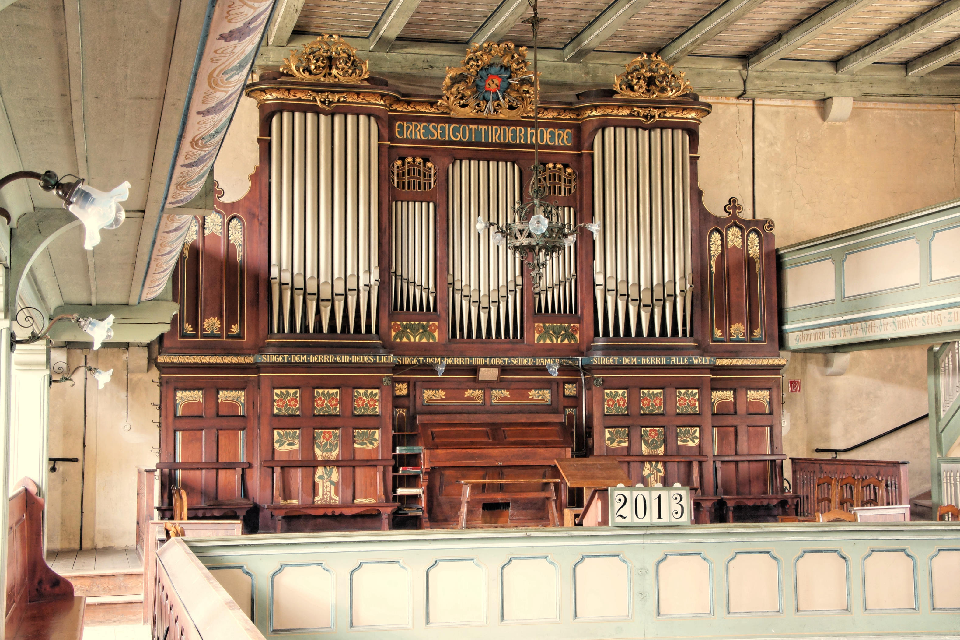 Orgel von Herrmann Eule, Bautzen, erbaut 1901/02